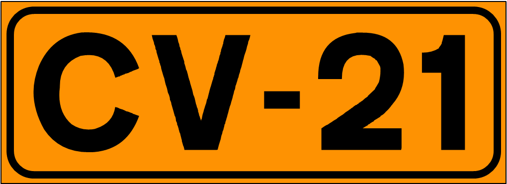 Inidcador de la Carretera de la Comunidad Valenciana CV-21